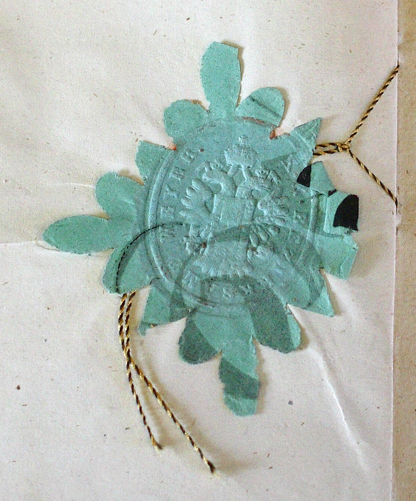 Dienstsiegel im Arbeitsbuch Otto Schönauers (Museum der Stadt Steyr)